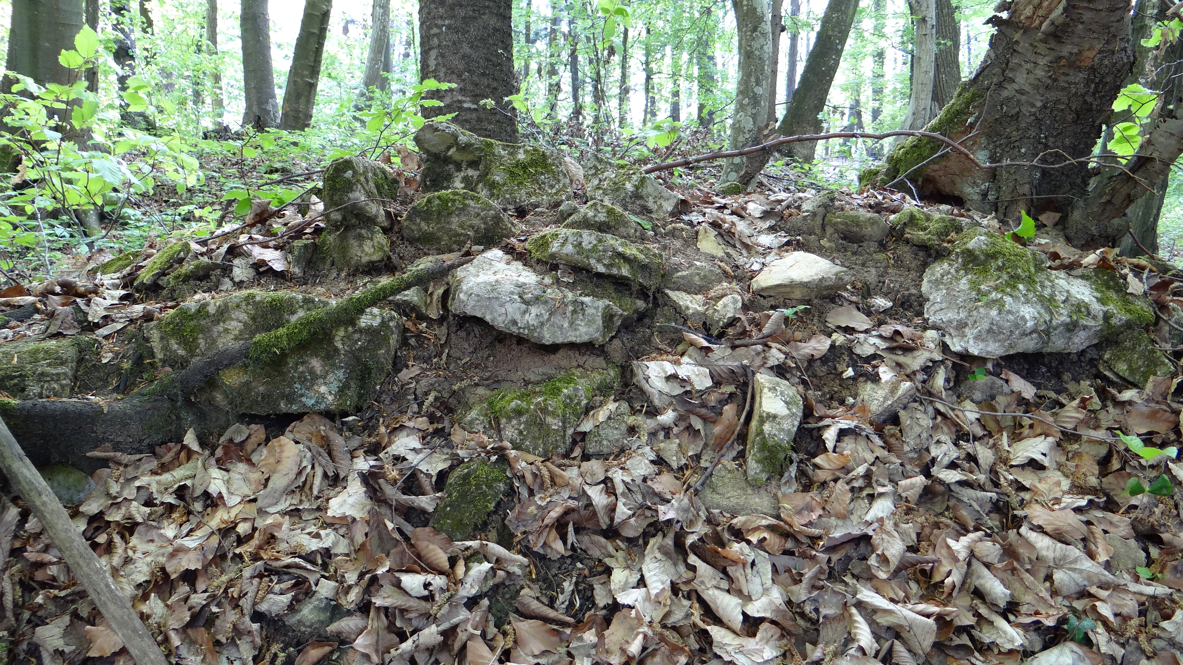 Ruševine gradu Gračeno 2014